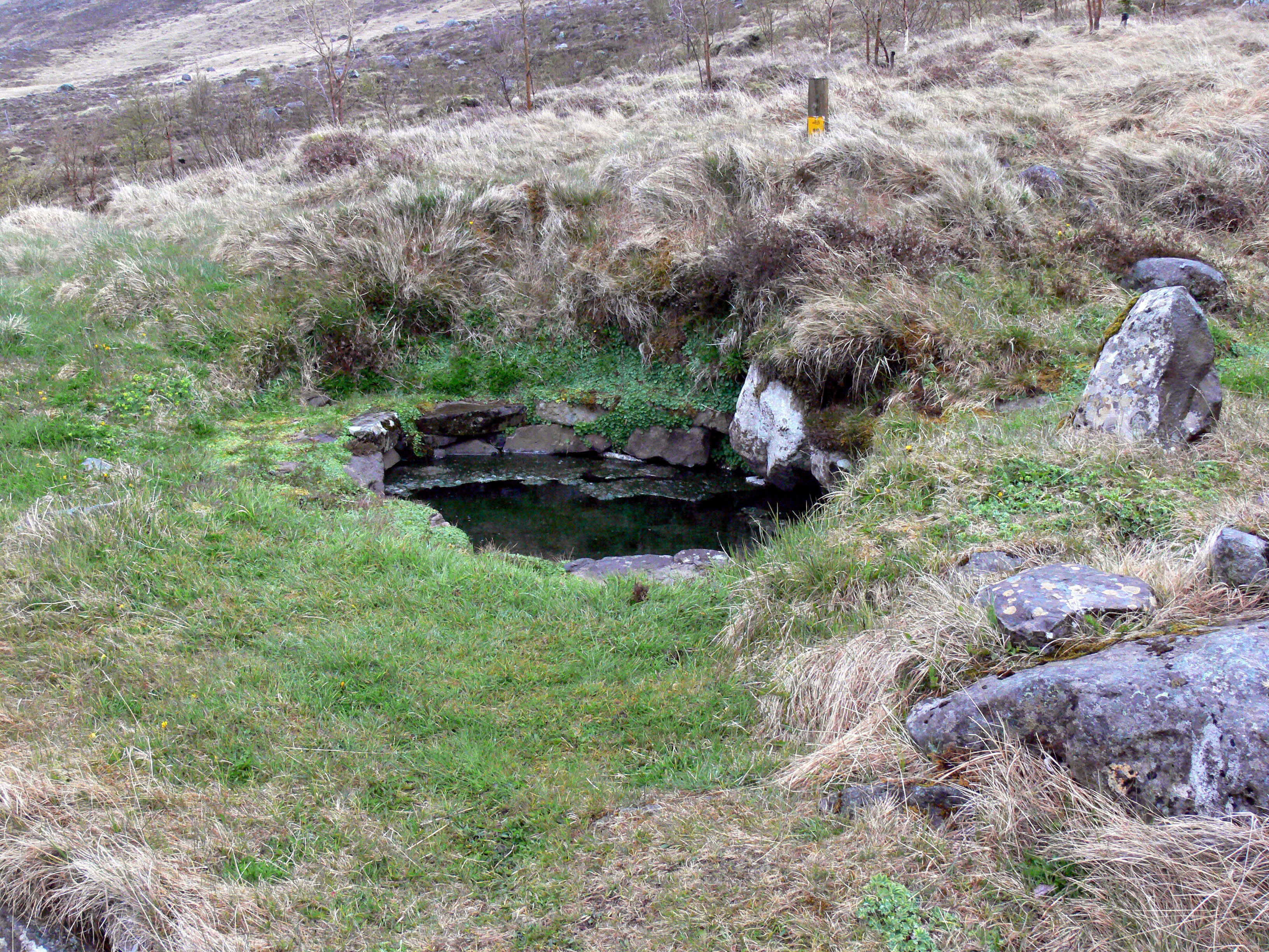 Krosslaug in Lundareykjadal bei Reykir. Hier wurden um 1000 die ersten Christen des Westlandes getauft (Kristnisaga).